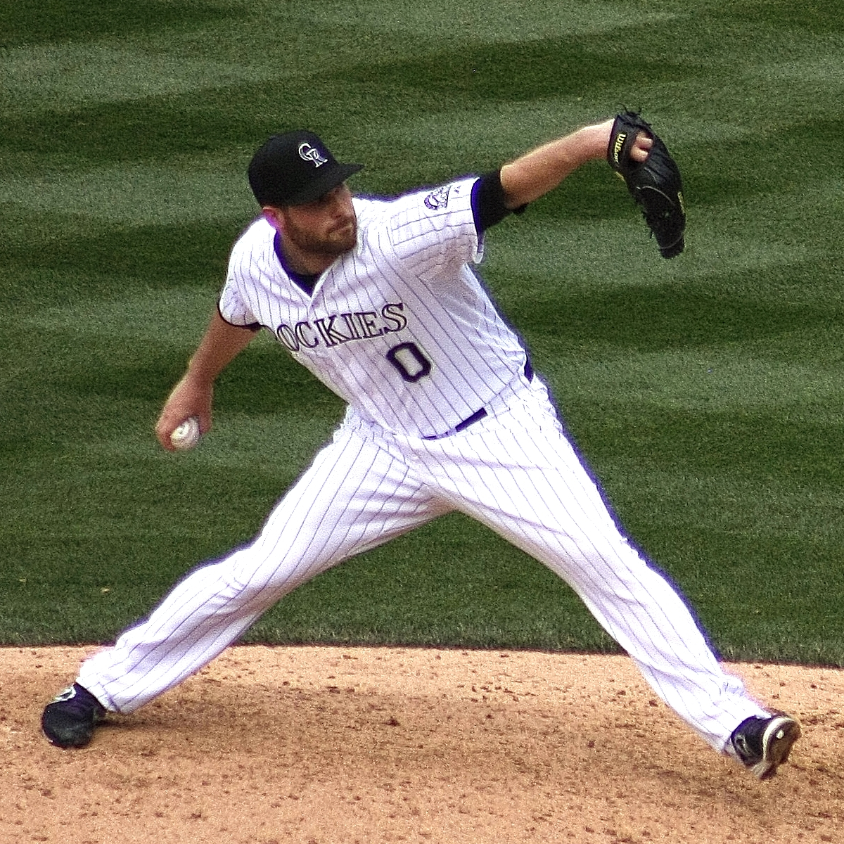 Adam Ottavino